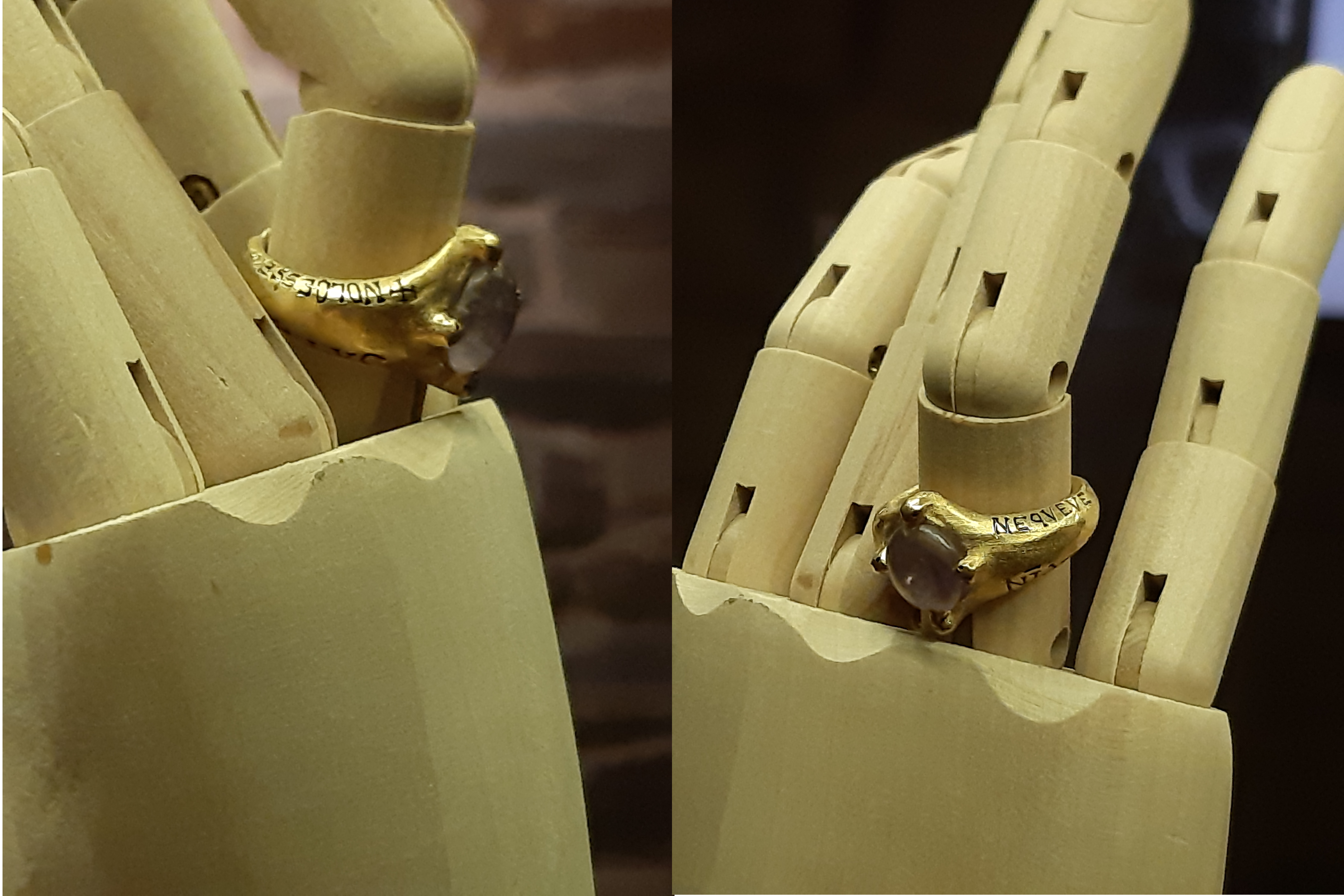 Reprodución do anel do bispo Gonzalo de Mondoñedo no museo parroquial de San Martiño de Mondoñedo.